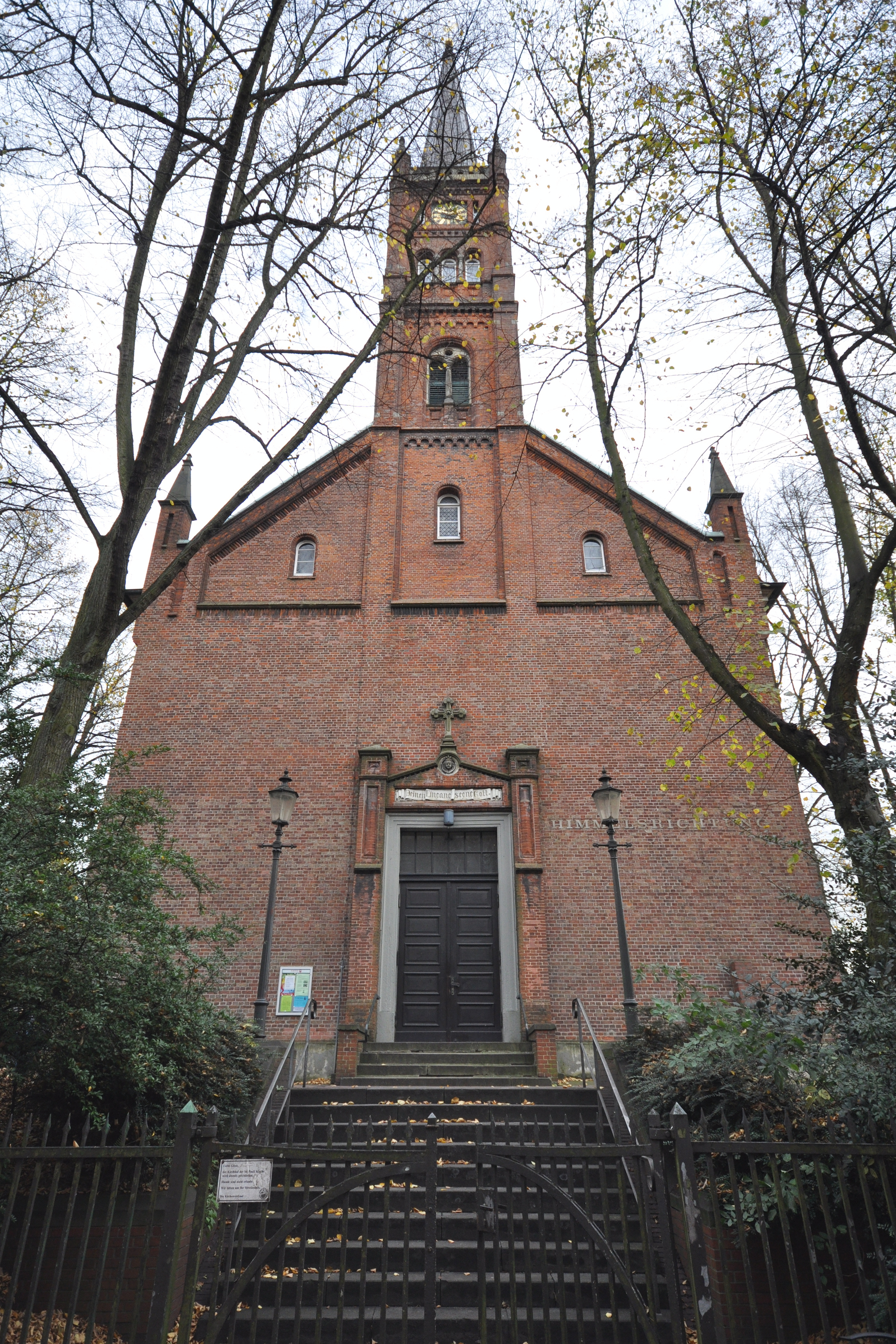 Westfassade der St.-Pauli-Kirche in Hamburg-Altona-Altstadt. This is a photograph of an architectural monument.